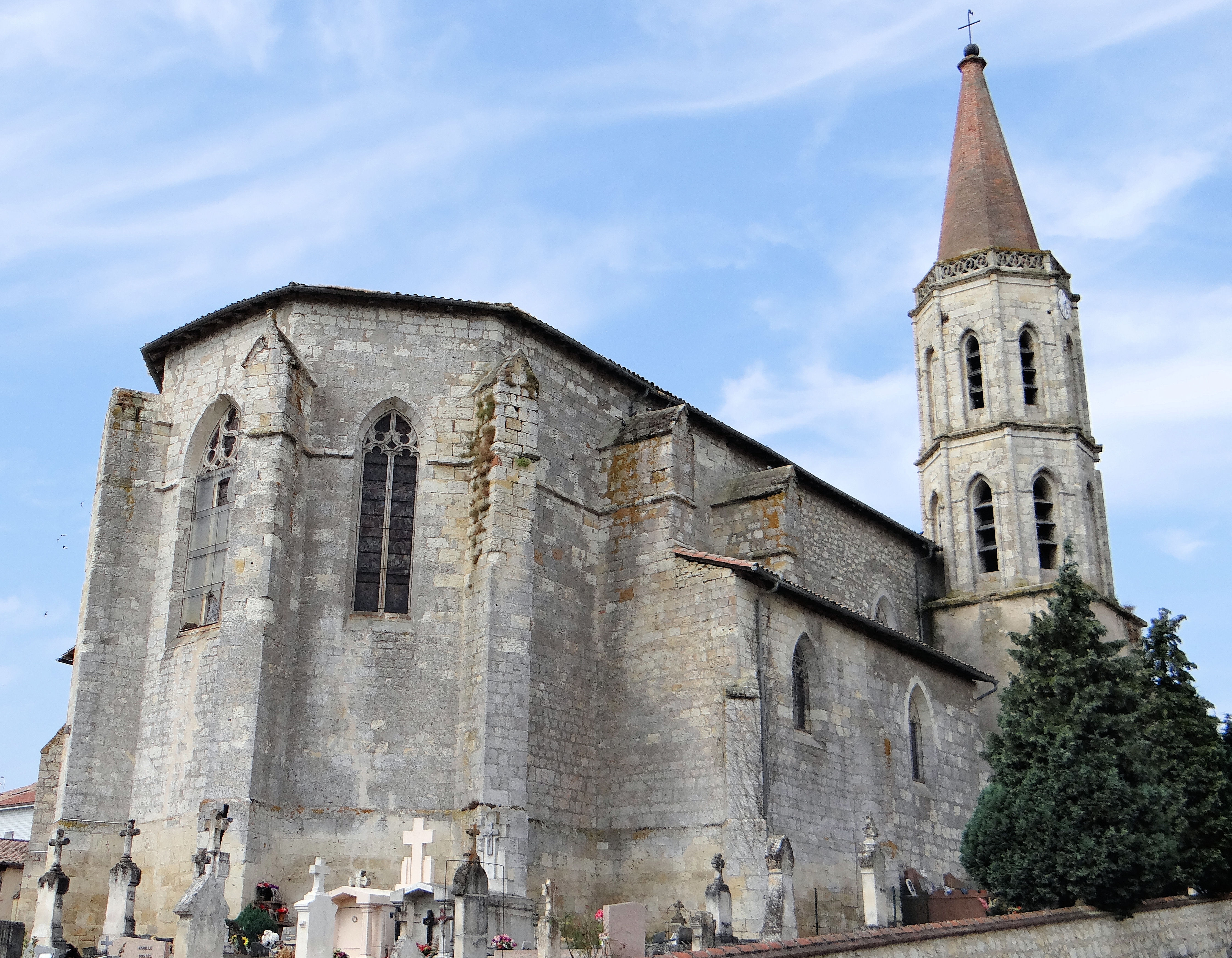 Dunes - Église Sainte-Madeleine - Chevet